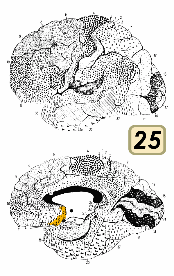 Brodmann area 25.